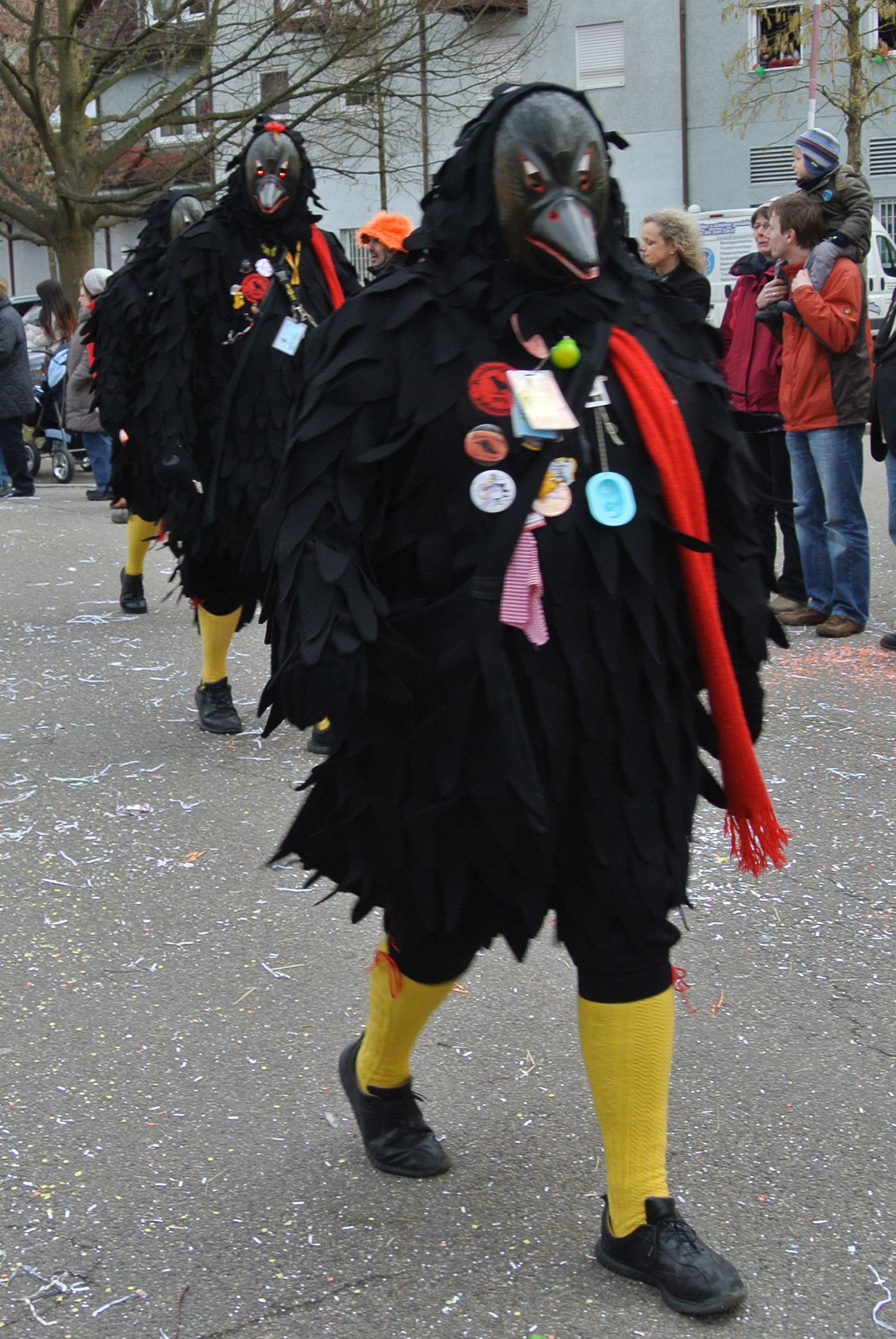 Hästräger der Krabbenzunft Kollmarsreute beim Jubiläumsumzug 22 Jahre Stein-Krähen-Hexen Kollnau am 9. Februar 2014